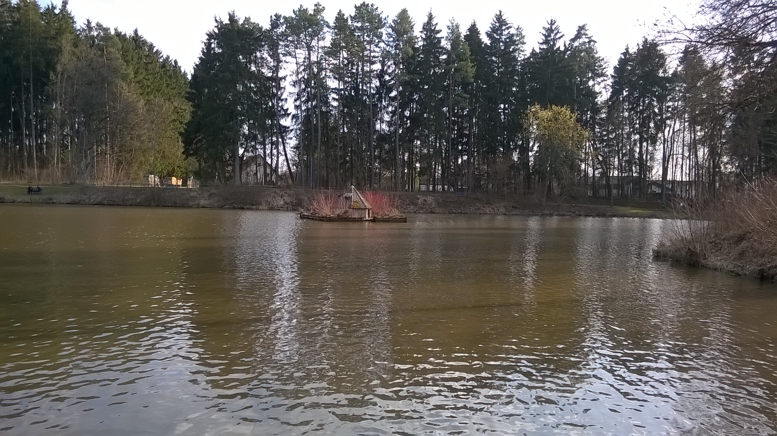 Dies ist ein Pflichtfeld.